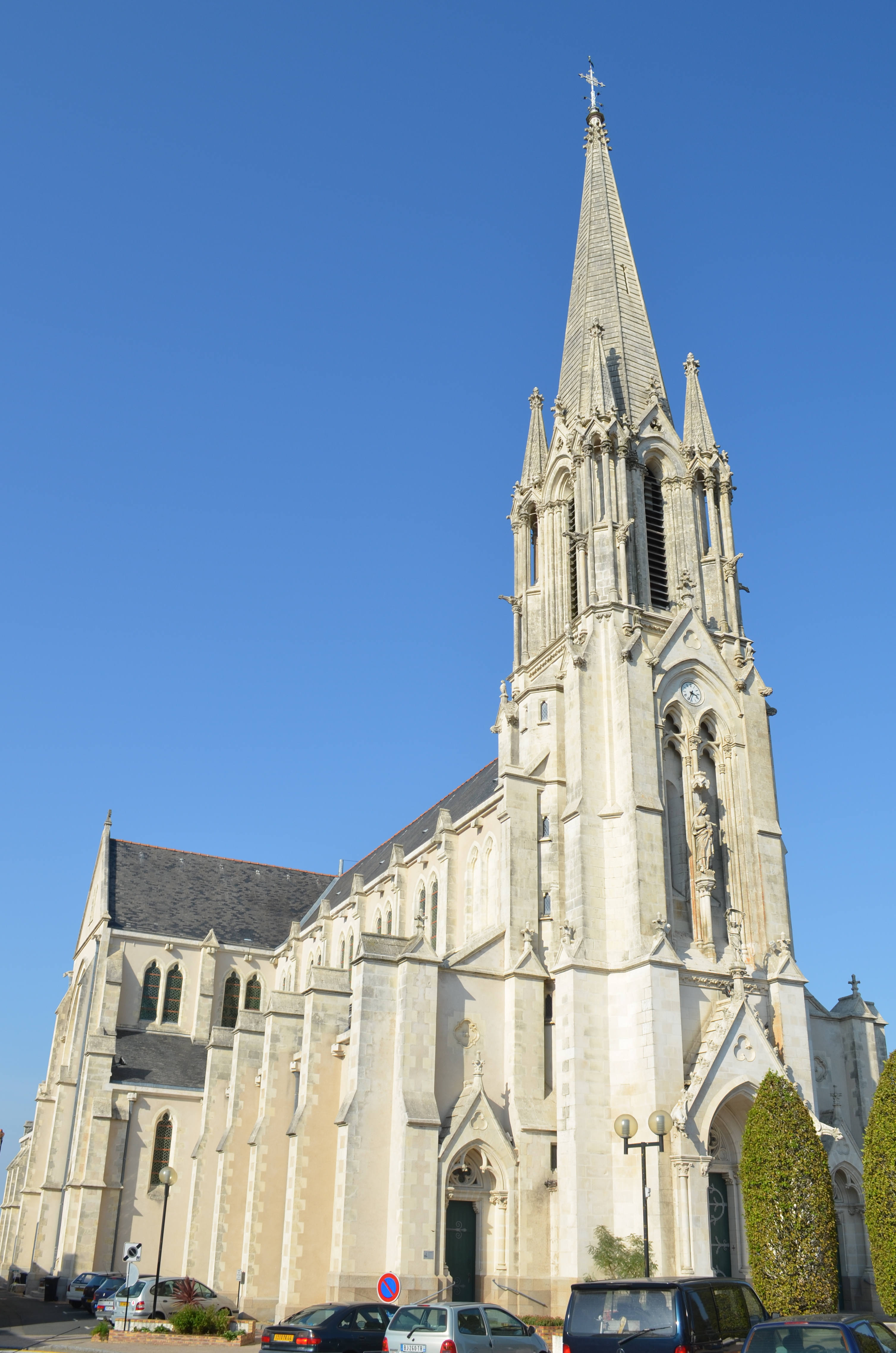 Eglise Notre-Dame de l'Assomption - La Chapelle-Basse-Mer (Loire-Atlantique)